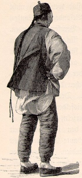 Chinese mit Zopf (Original text: Chinese mit Zopf) Urheberrecht: spätestens 1988 abgelaufen (70 Jahre nach dem Tod des Autors)